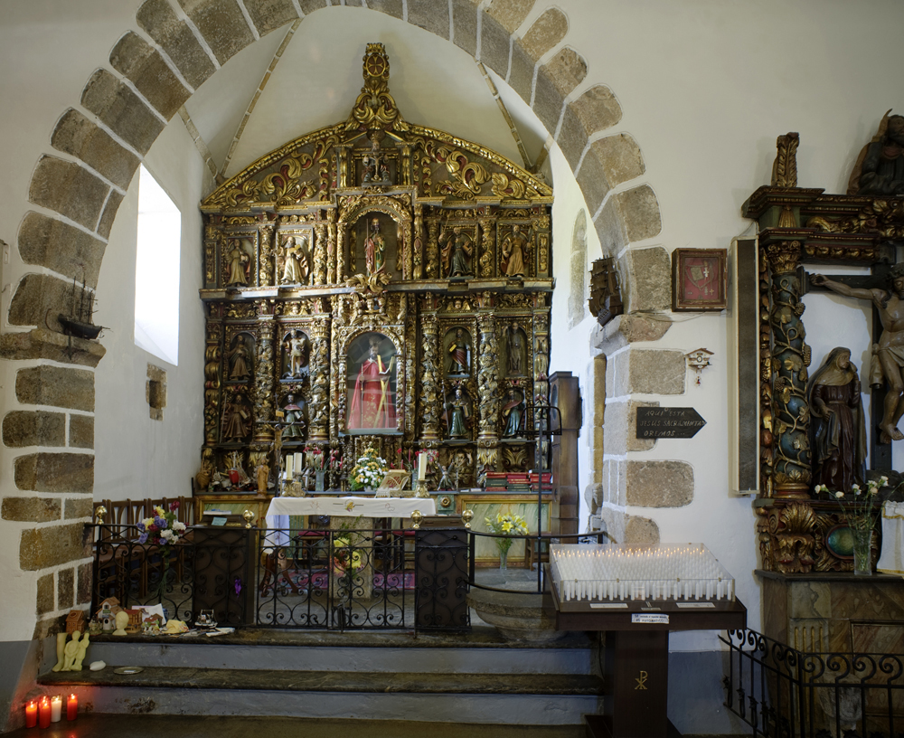 unidentified Cultural Heritage Spainp